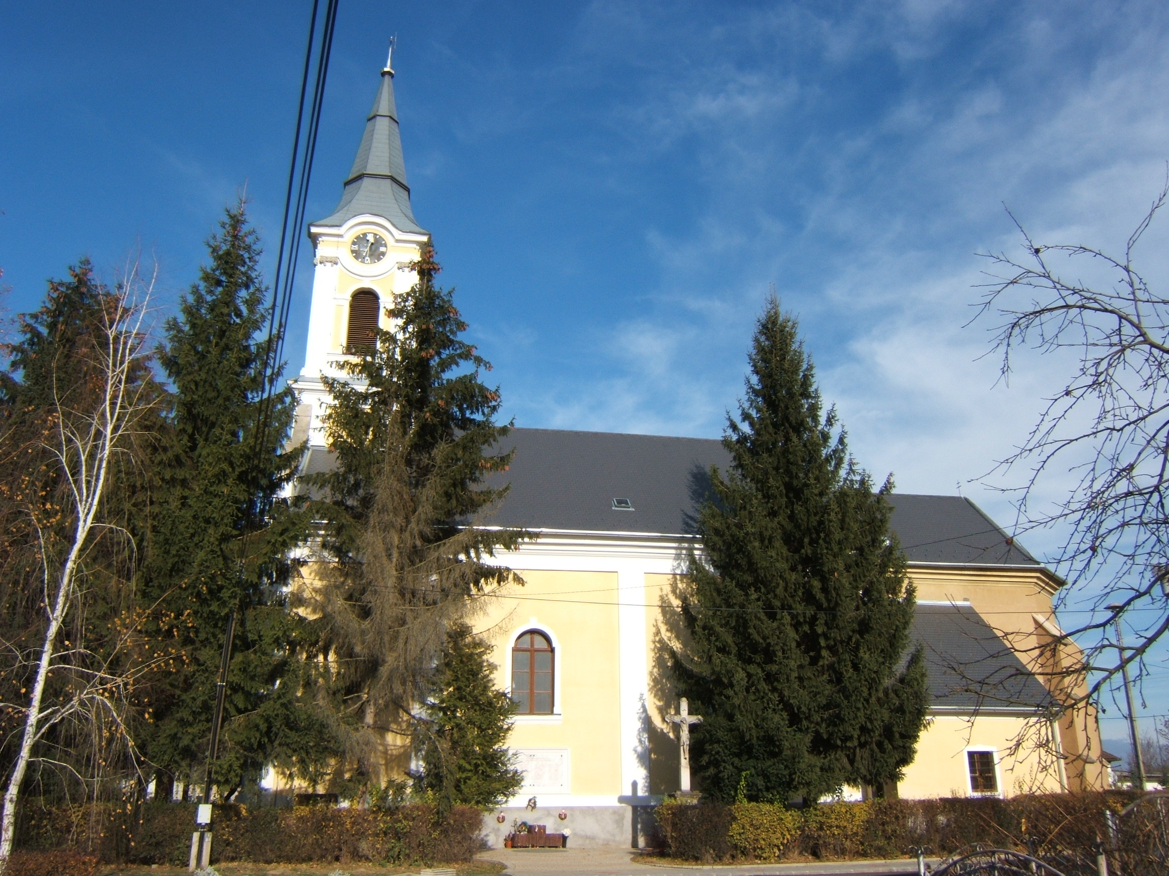 Törökkoppány, templom